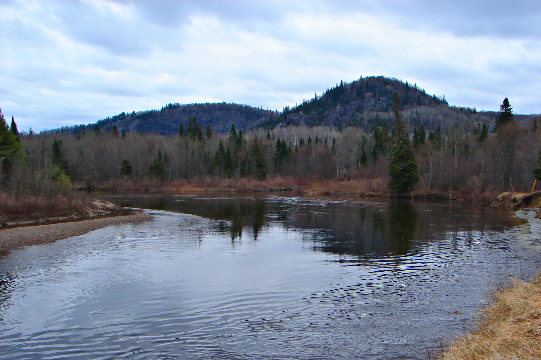 Goulais River, Algoma District, Ontario, Canada